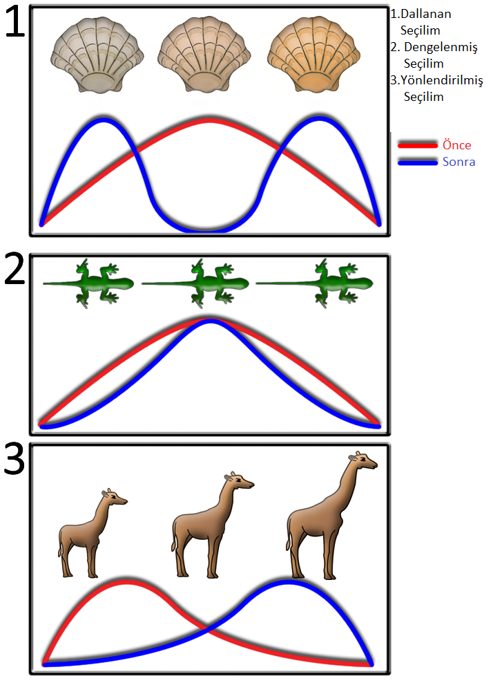 Üç çeşit doğal seçilimi gösteren bir grafik